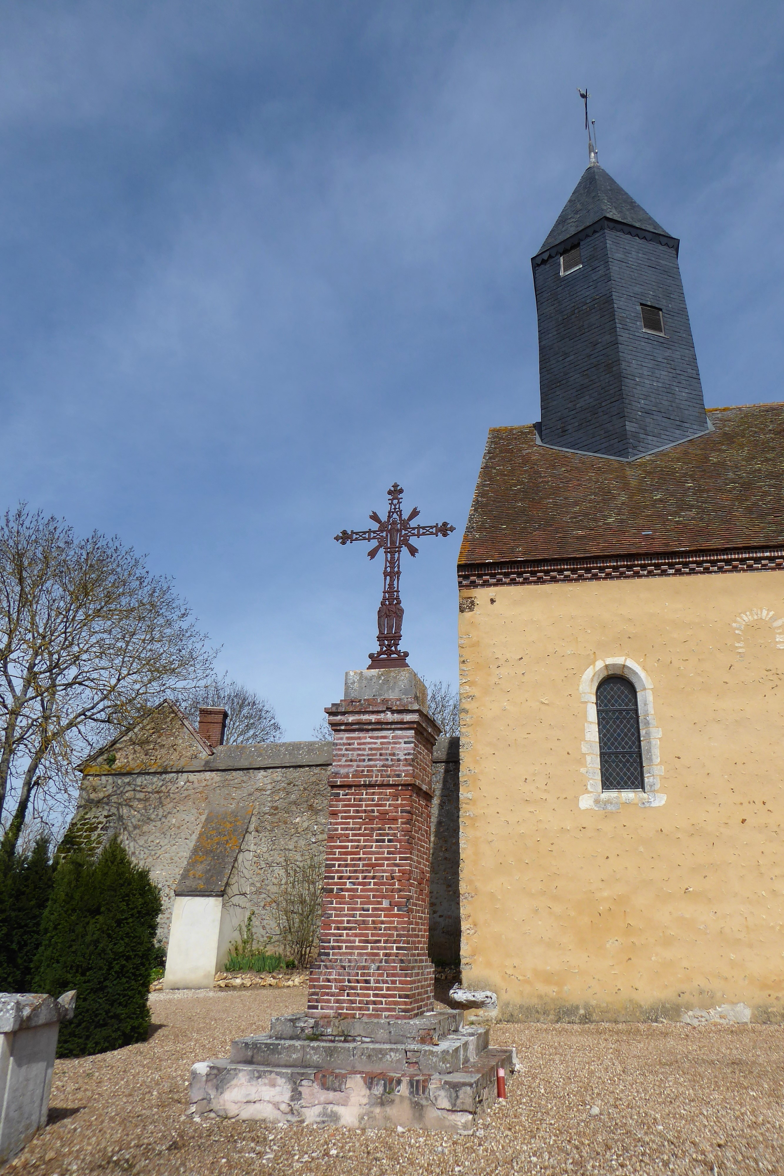 Tombe, croix, baie romane et clocher de l'église Saint-Michel, Saint-Ange, Eure-et-Loir, France.